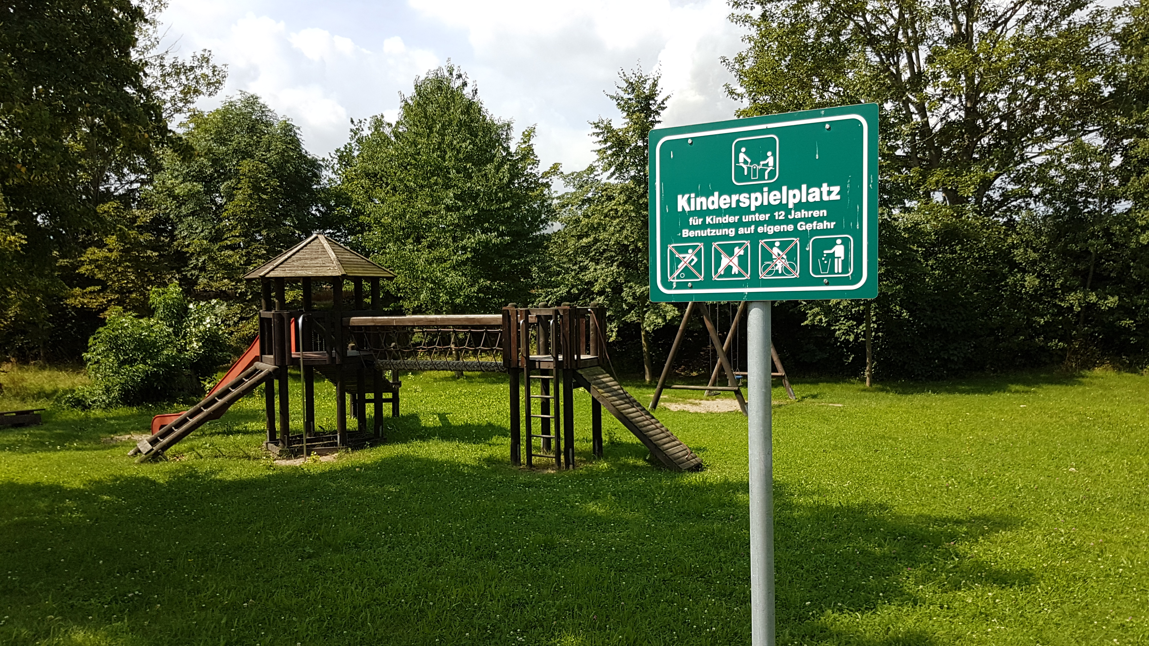 Bild vom Kinderspielplatz am Spahnsdorfer Weg in Gaulis.